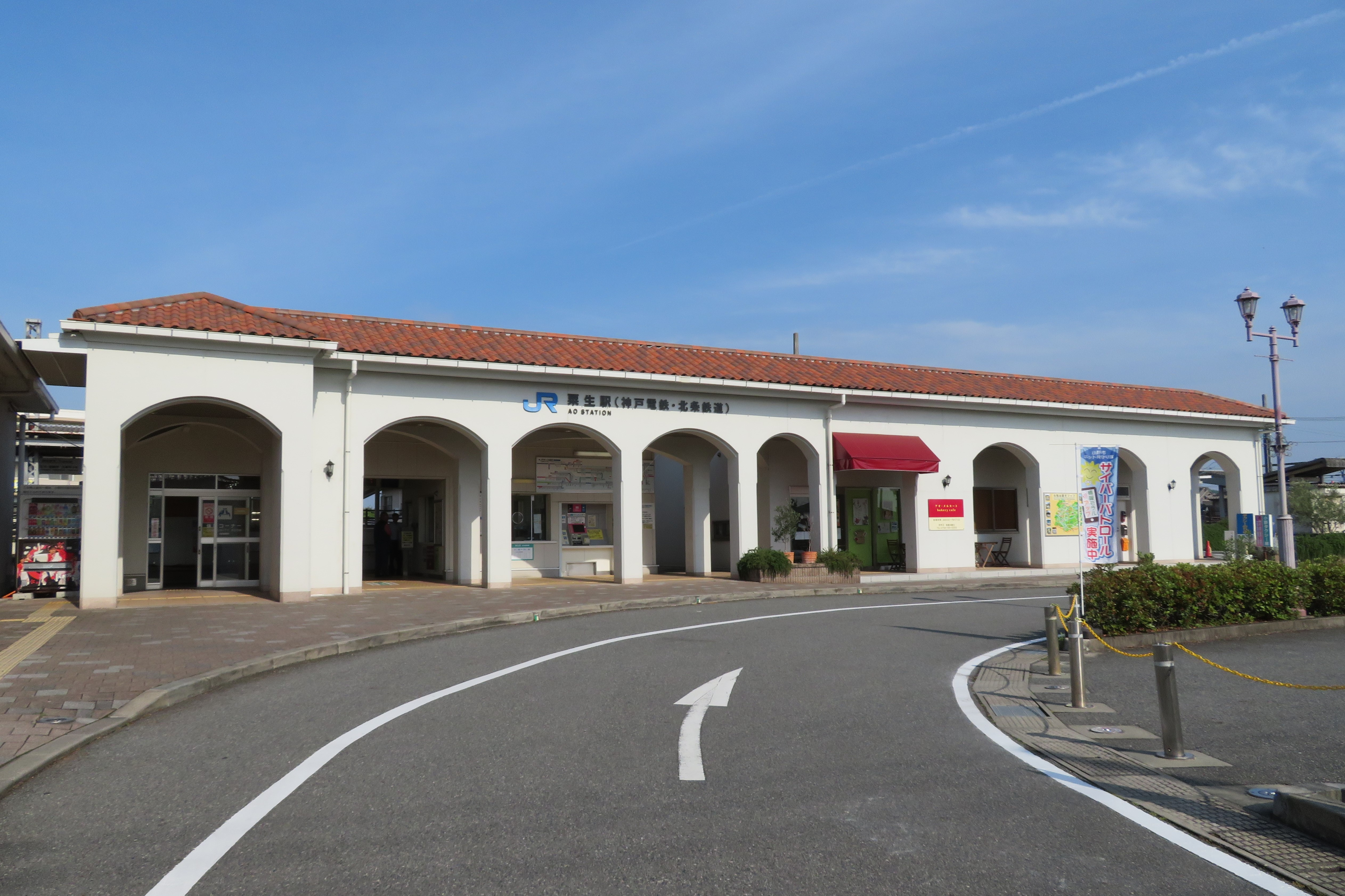 JR・神戸電鉄・北条鉄道粟生駅 Canon PowerShot SX730 HS